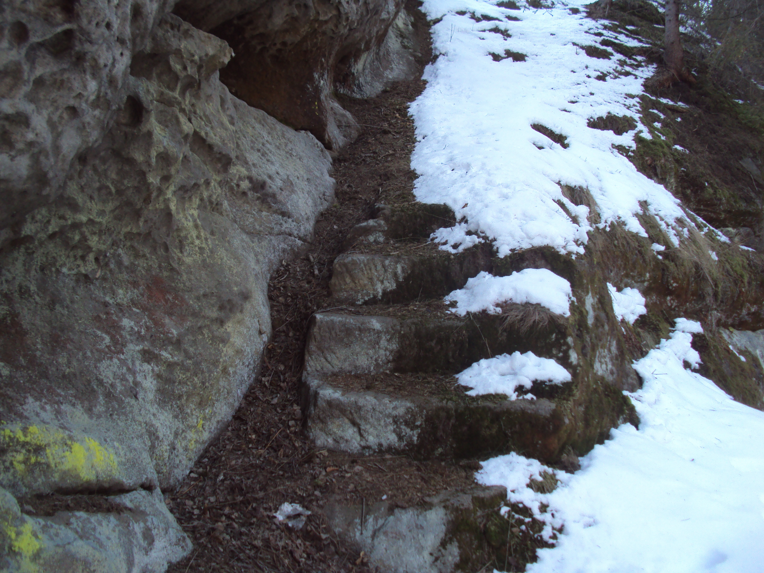 Schody k vrcholu hrádku Vejrov